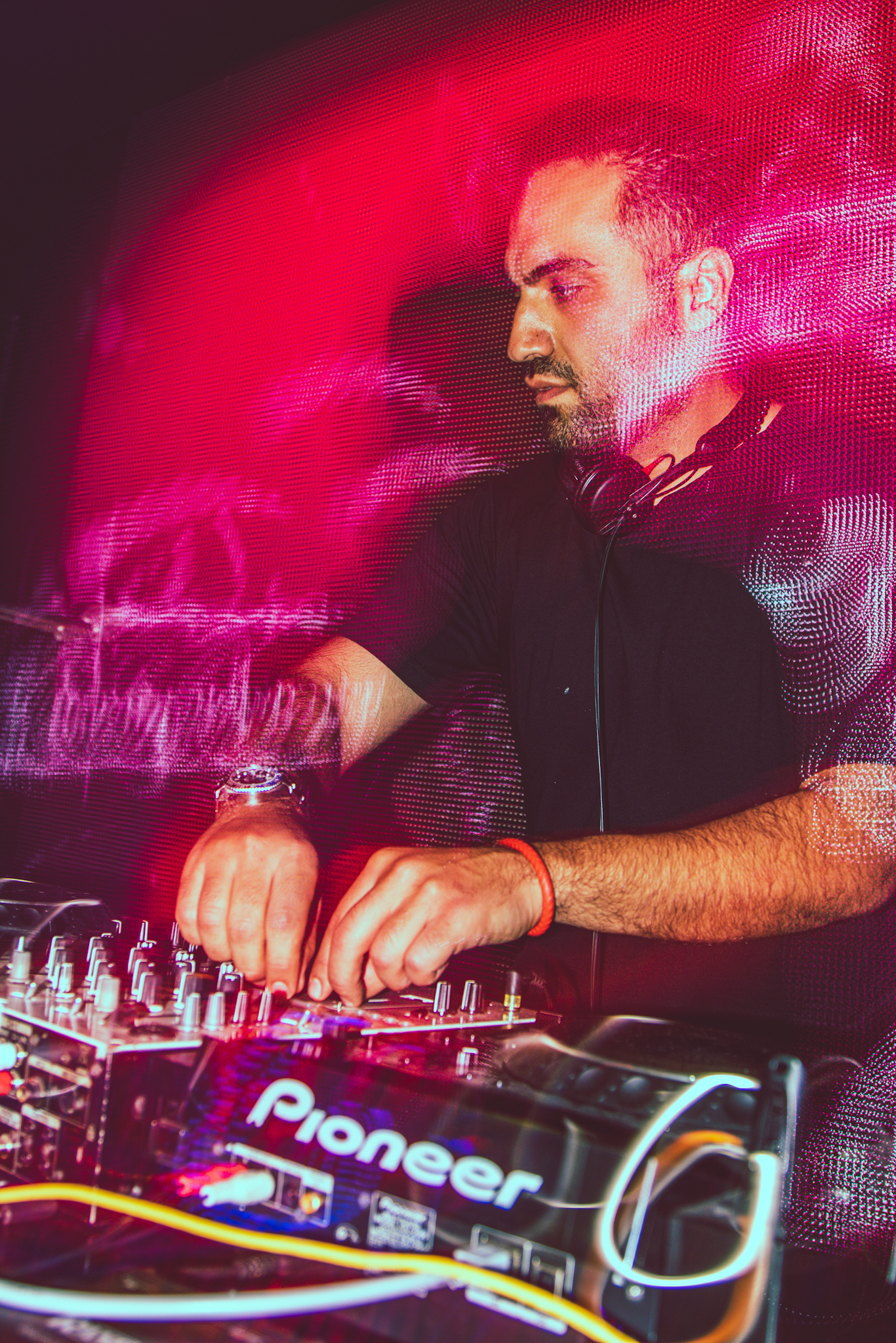 عکس توسط پوریا افخمی در کلاب سِنات شهر تفلیس ثبت شده است.